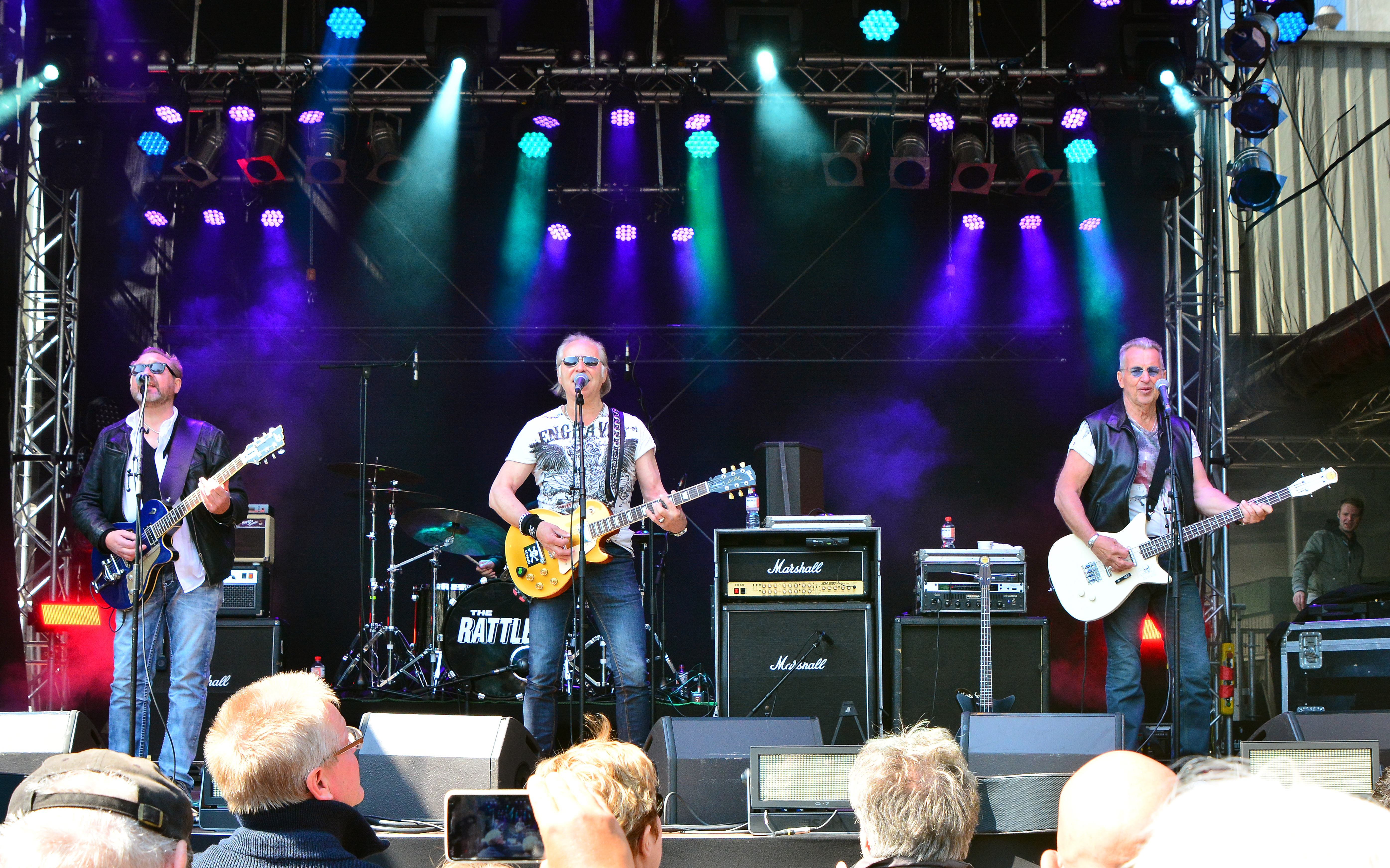 The Rattles beim „Holsten Brauereifest 2015“ in Hamburg